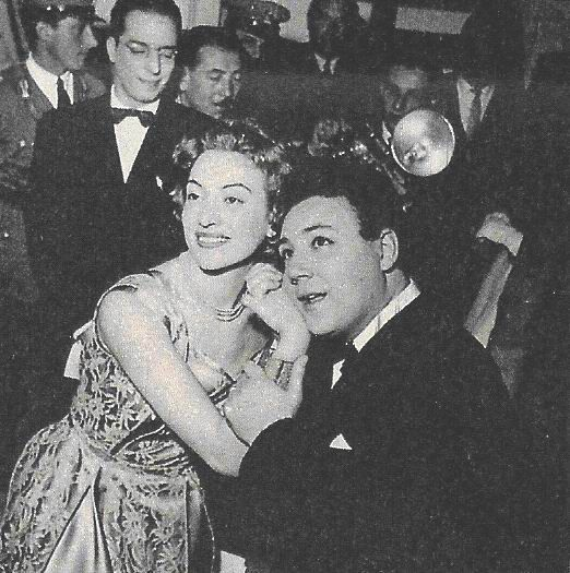 Il vincitore del Festival di Sanremo 1955, Claudio Villa con la presentatrice Maria Teresa Ruta